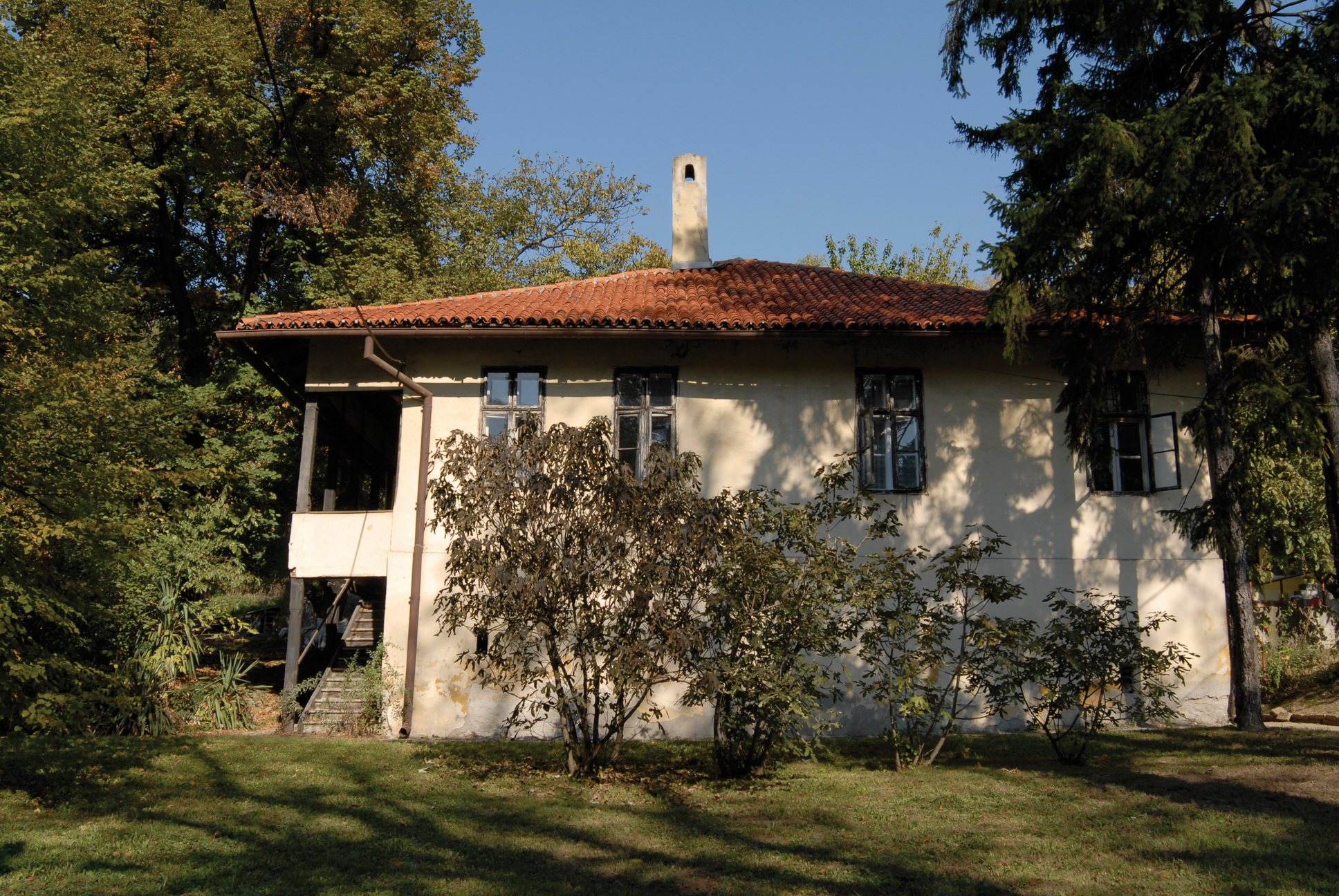 Зграда црквеног конака у Топчидеру